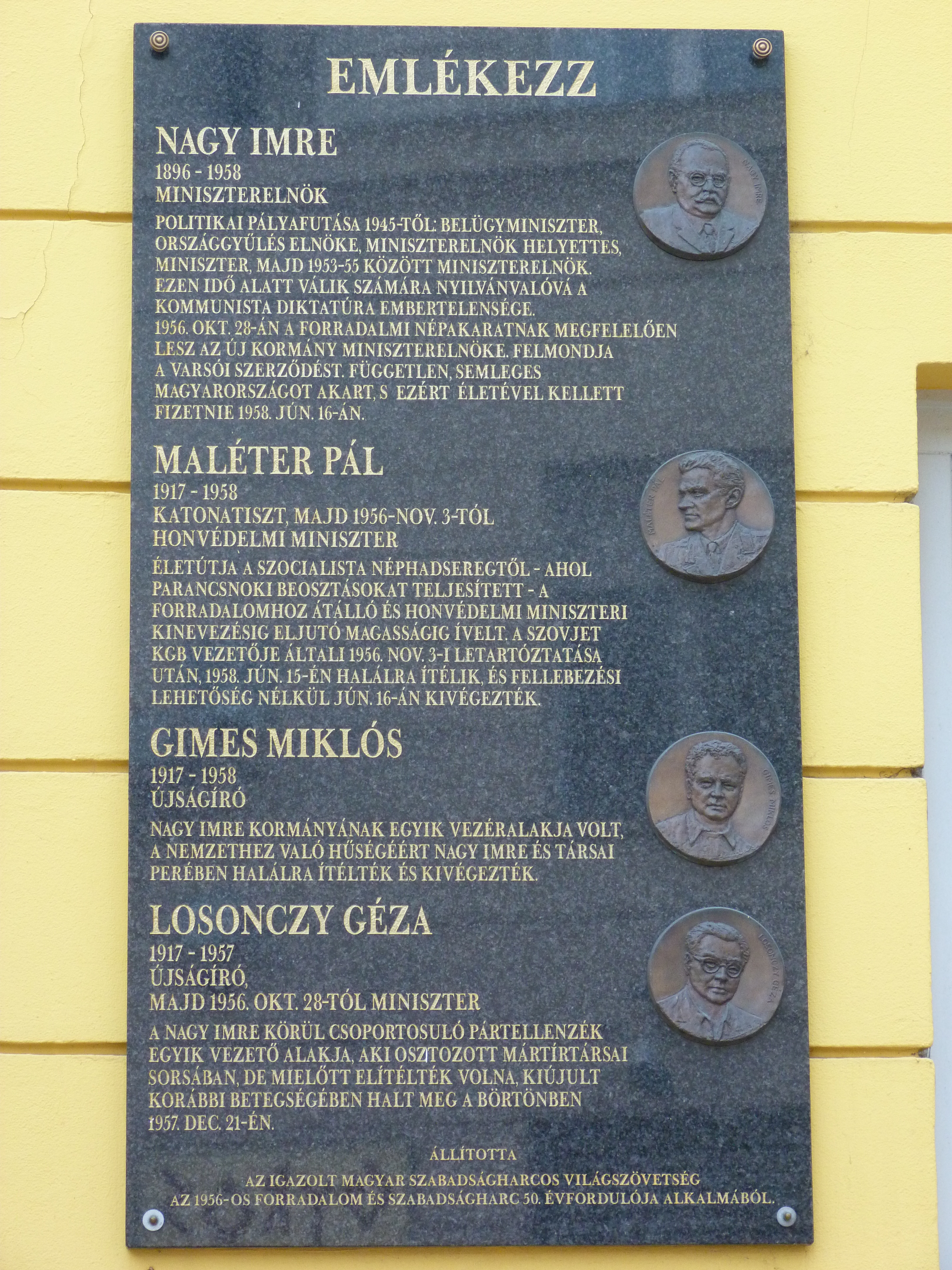 A felvétel 2012. december 5 -én készült Budapesten, a Józsefvárosban. Corvin köz. ©© Published under Creative Commons in the Metapolisz DVD line. All of the photos and vids in the Metapolisz DVD line are under Creative Commons and can be used even for commercial – for profit – purposes. Recommended Citation Derzsi Elekes Andor: Metapolisz DVD line ©© Megjelent Creative Commons alatt a Metapolisz sorozatban. A Metapolisz sorozat valamennyi képe és filmje Creative Commons alatti valamint kereskedelmi - for profit - célra is felhasználható. Ajánlott hivatkozás: Derzsi Elekes Andor: Metapolisz DVD line . A tábláról másik fénykép: File:Budapest-corvin-nagy-imre.jpg